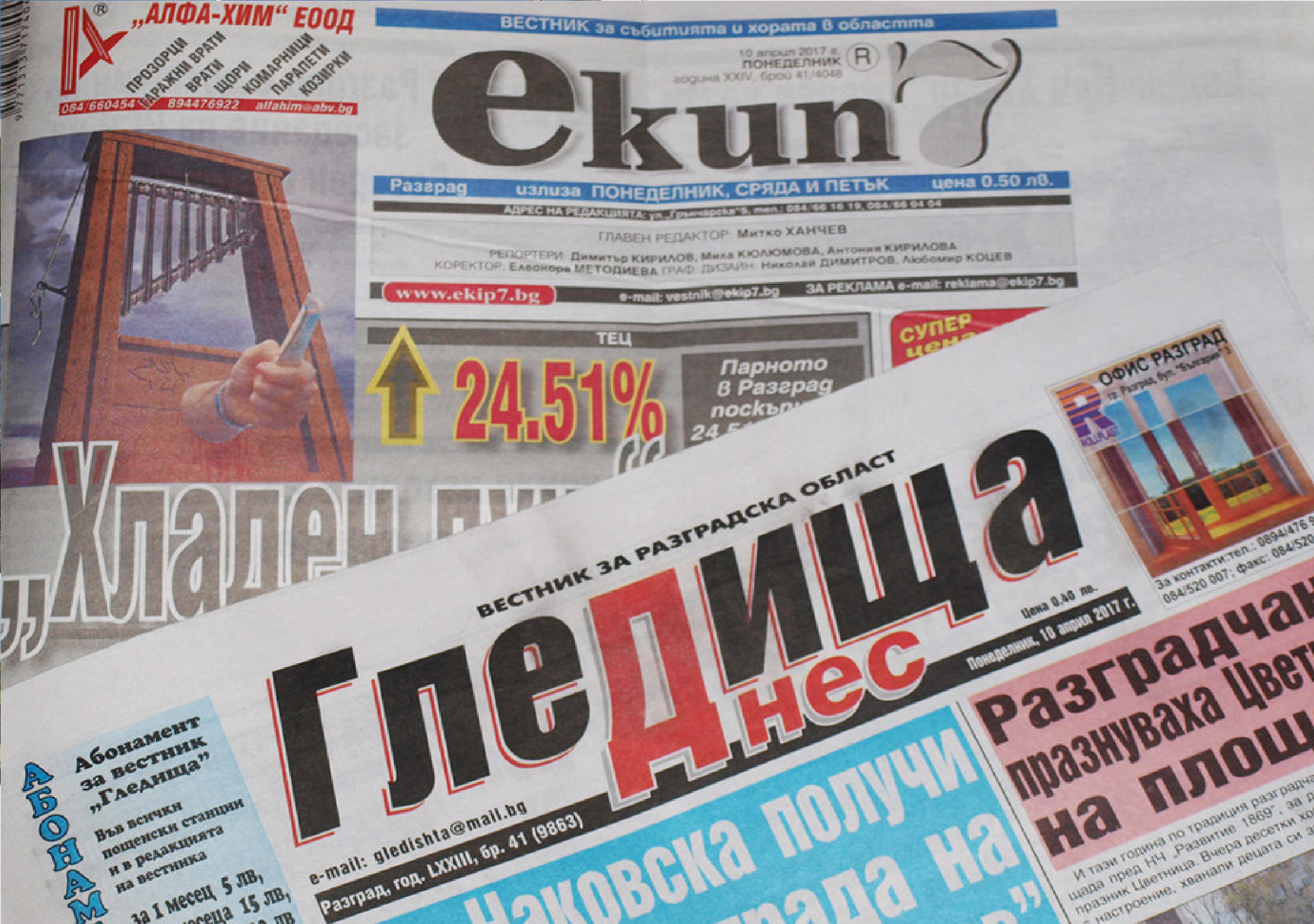 Вестници ,издавани в Разград